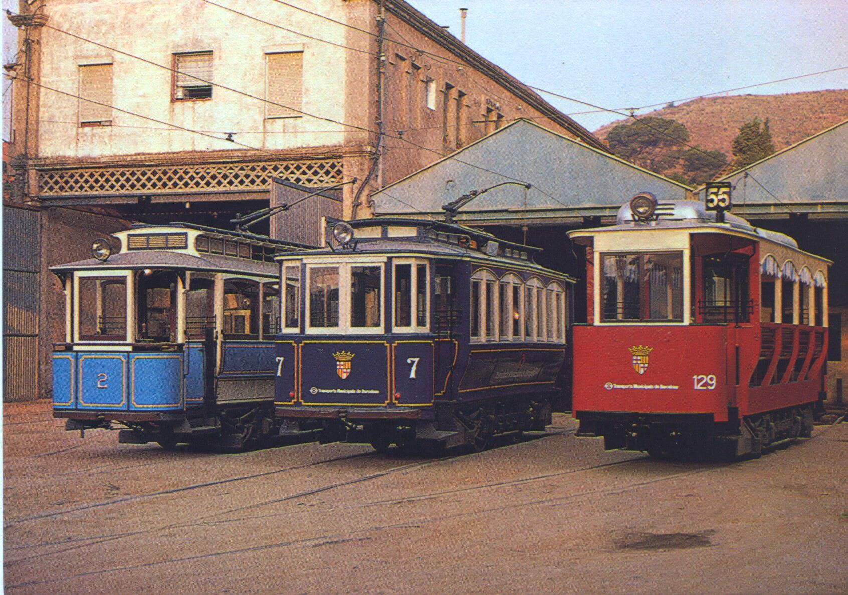 Tibidabo tramvias